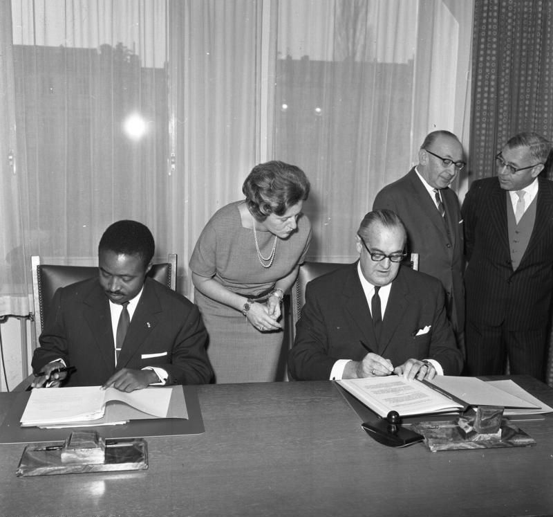 Vertragsunterzeichnung: Bundesrepublik-Elfenbeinküste über wirtschaftliche und technische Zusammenarbeit.